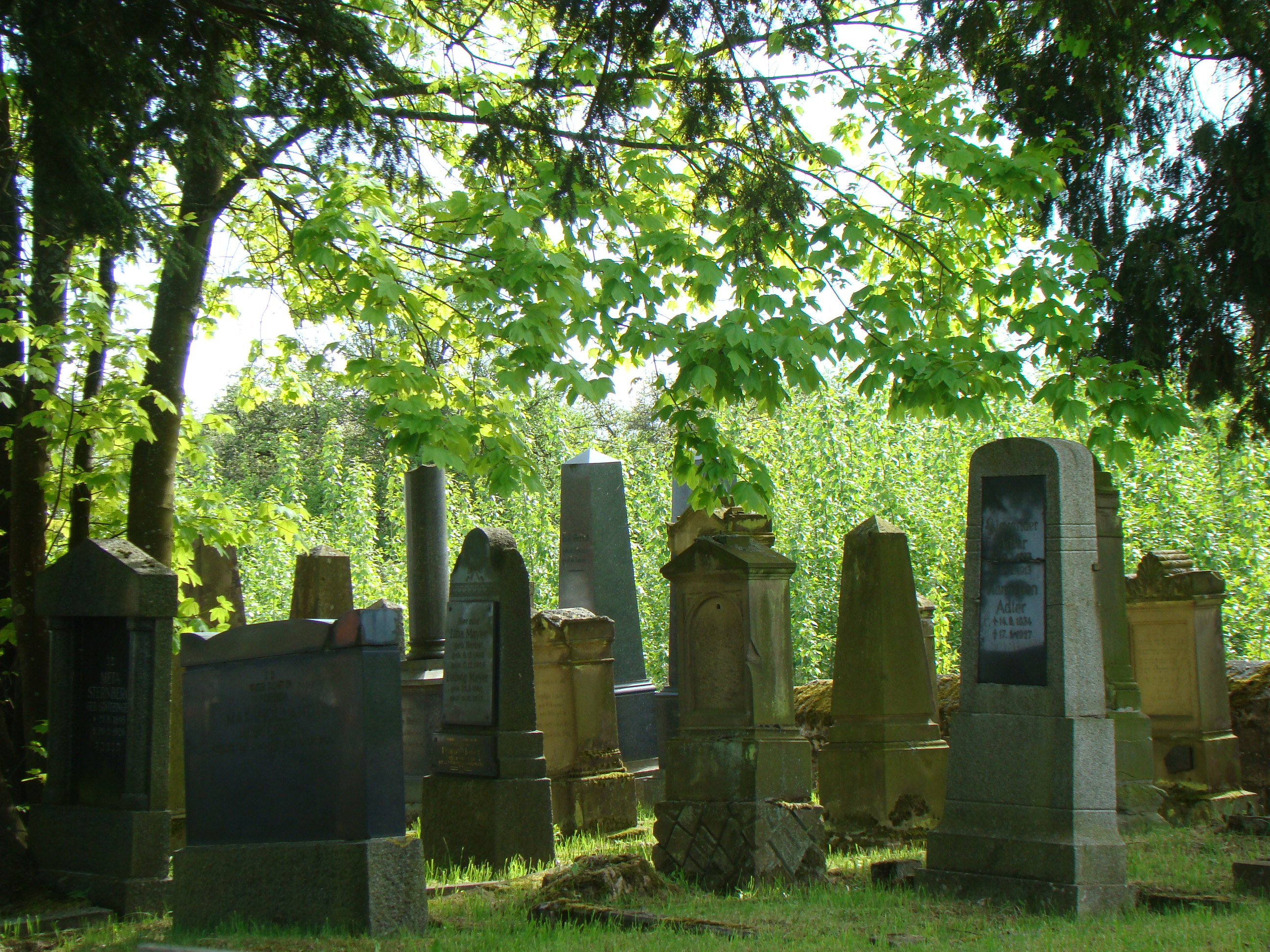 Jüdischer Friedhof Bad Rappenau